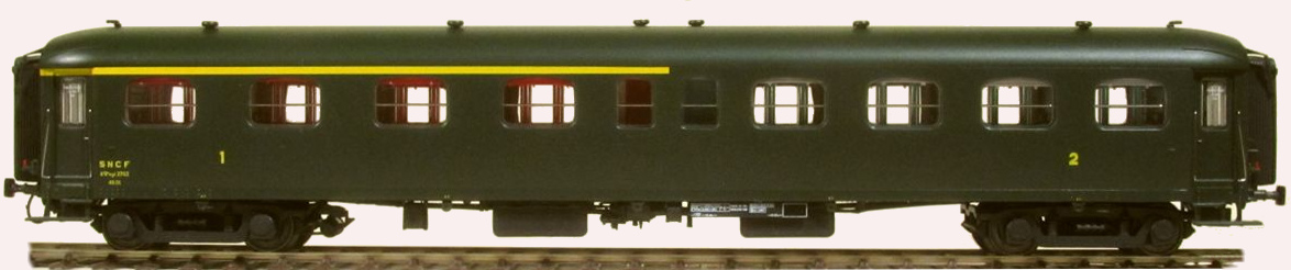 Modèle réduit LS Models de voiture Rapide Nord A4B4 SNCF